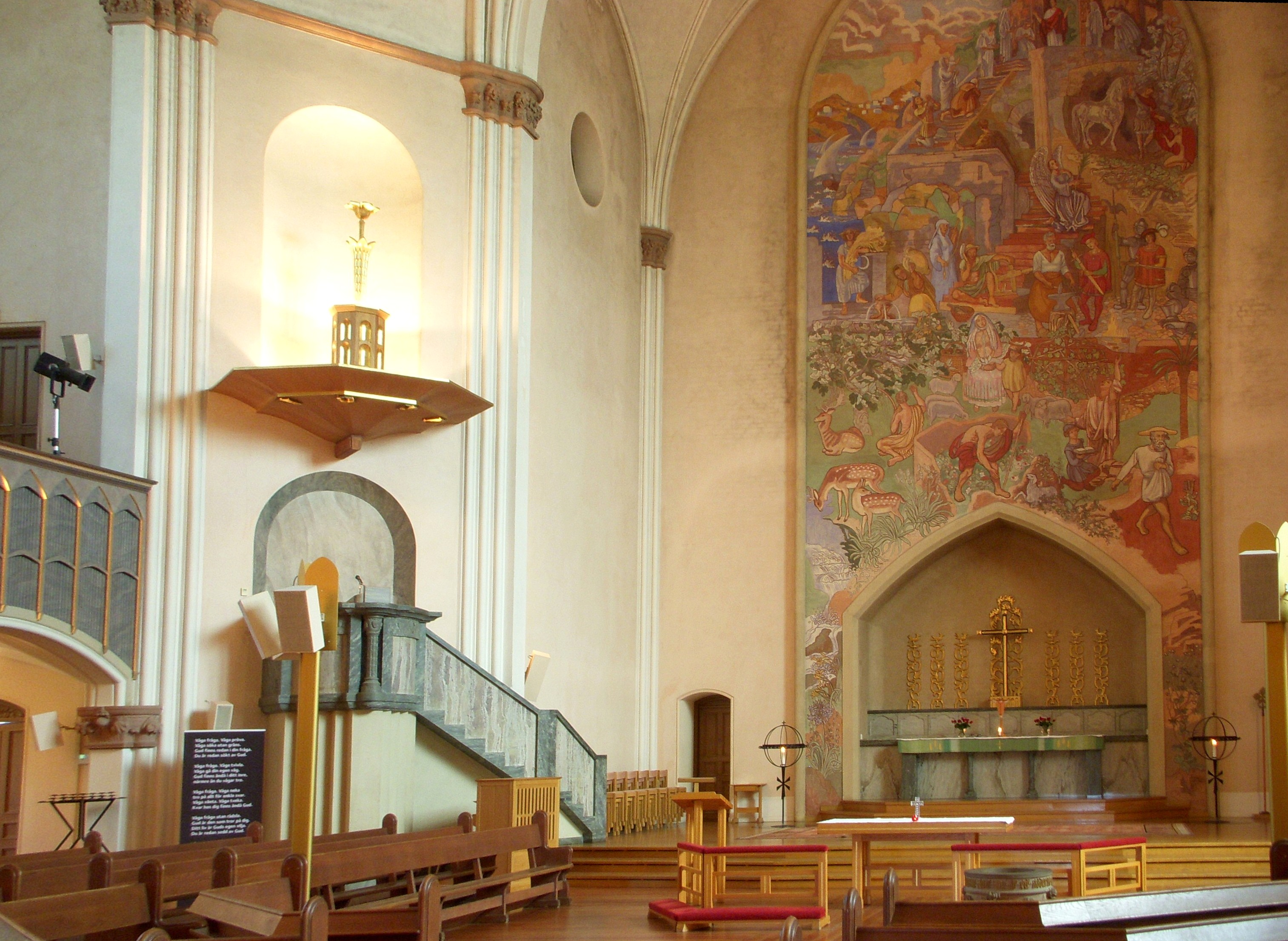 Sofia kyrka på Södermalm i Stockholm, interiör